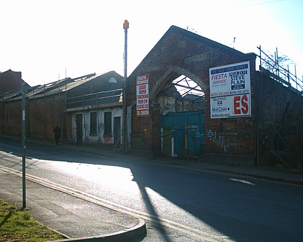 Heeley Tram Depot